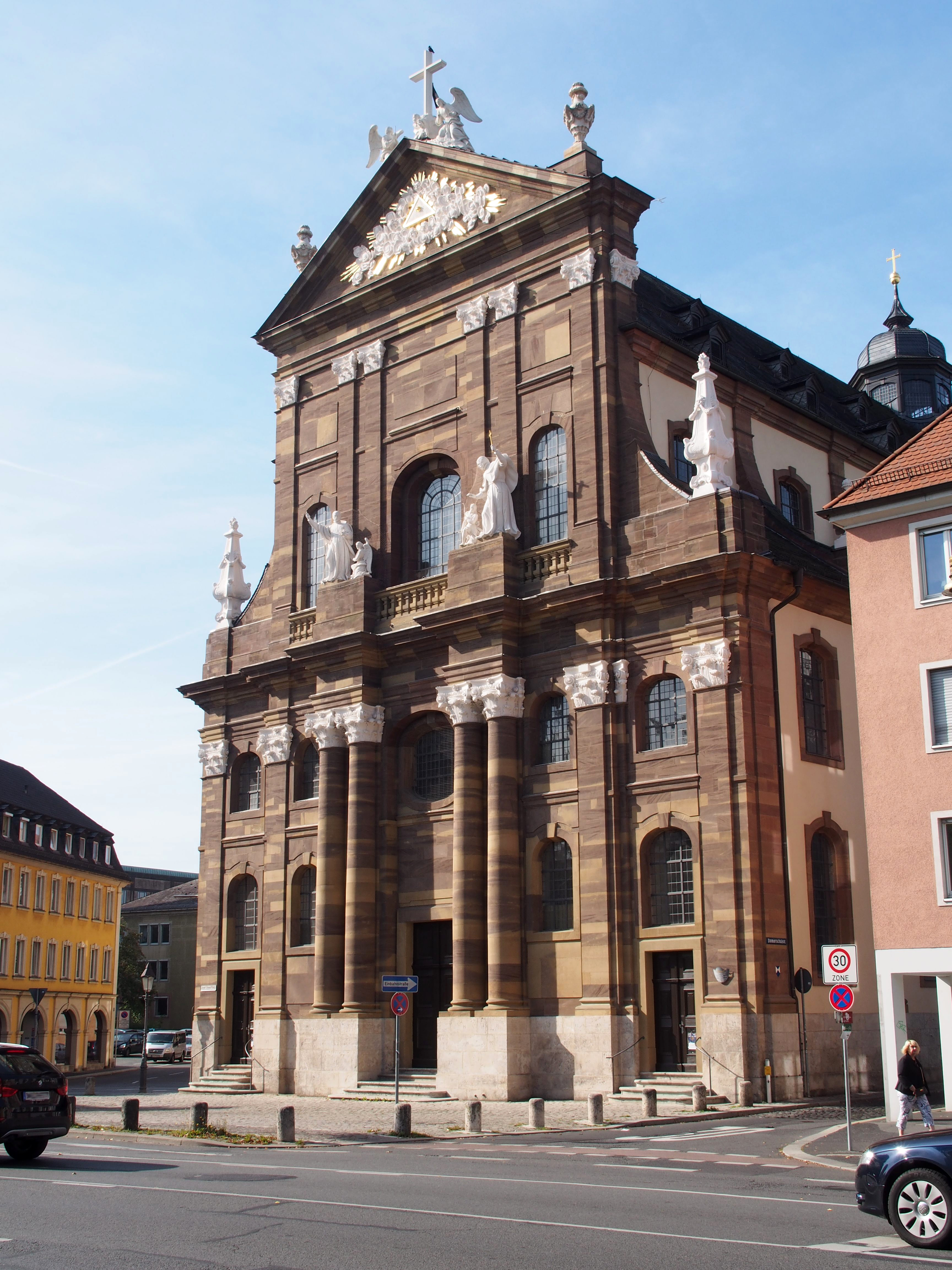 Kirche St. Michael, Würzburg